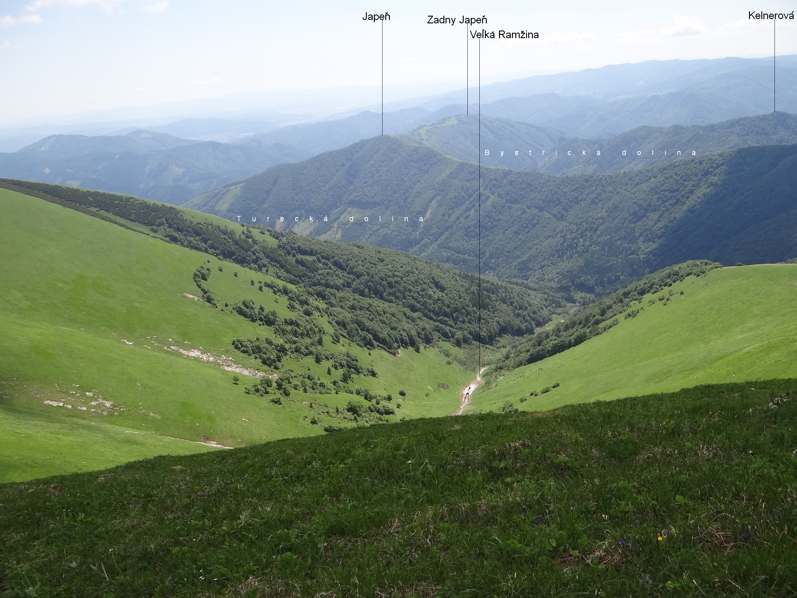 Japeň, Turecká dolina, Veľká Ramžiná